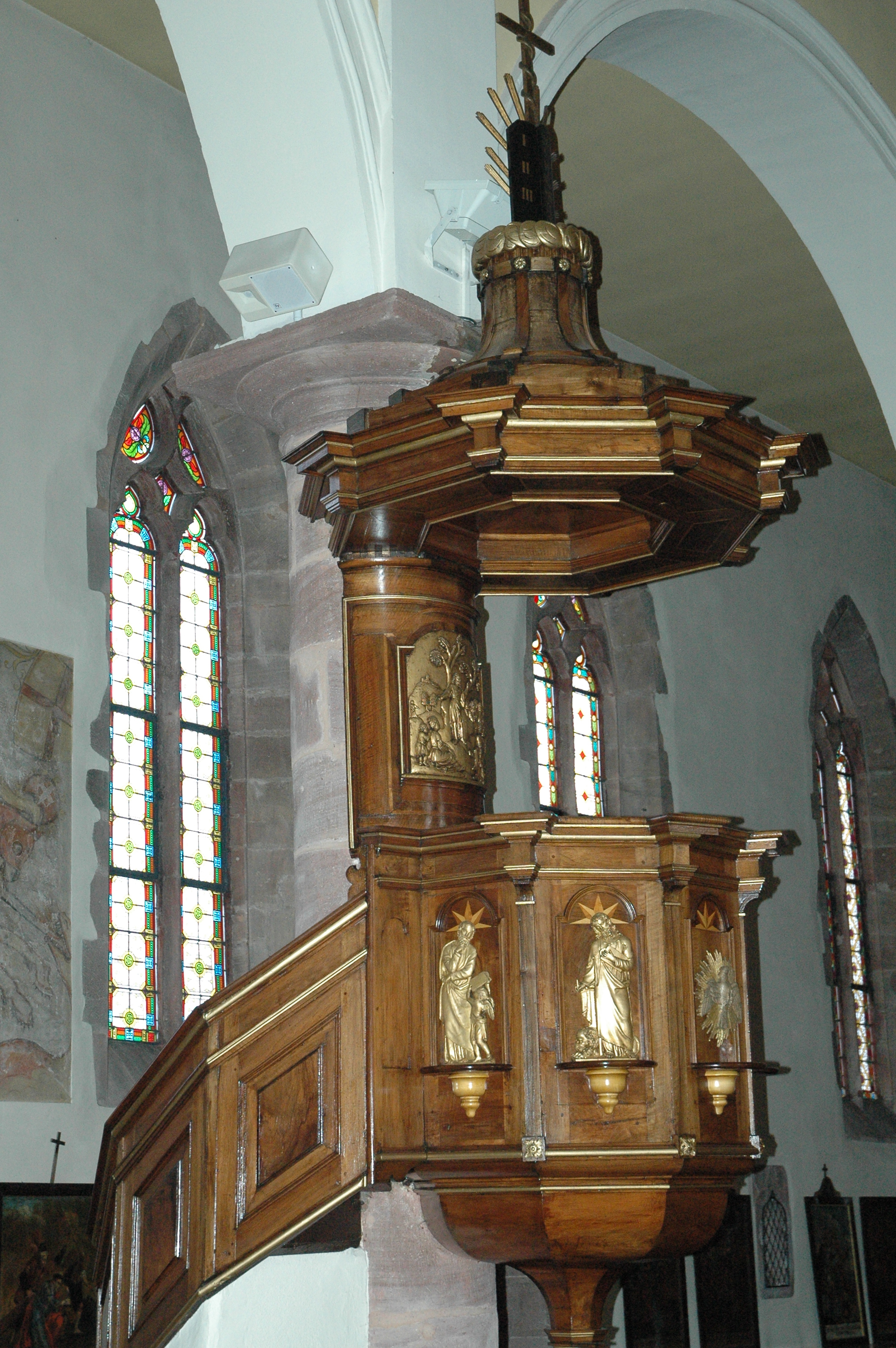 A 303